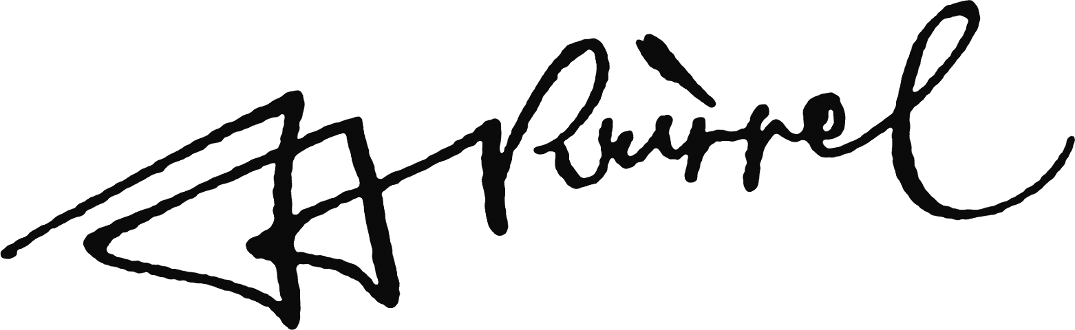 Heinrich Krippel'in kişisel imzası.